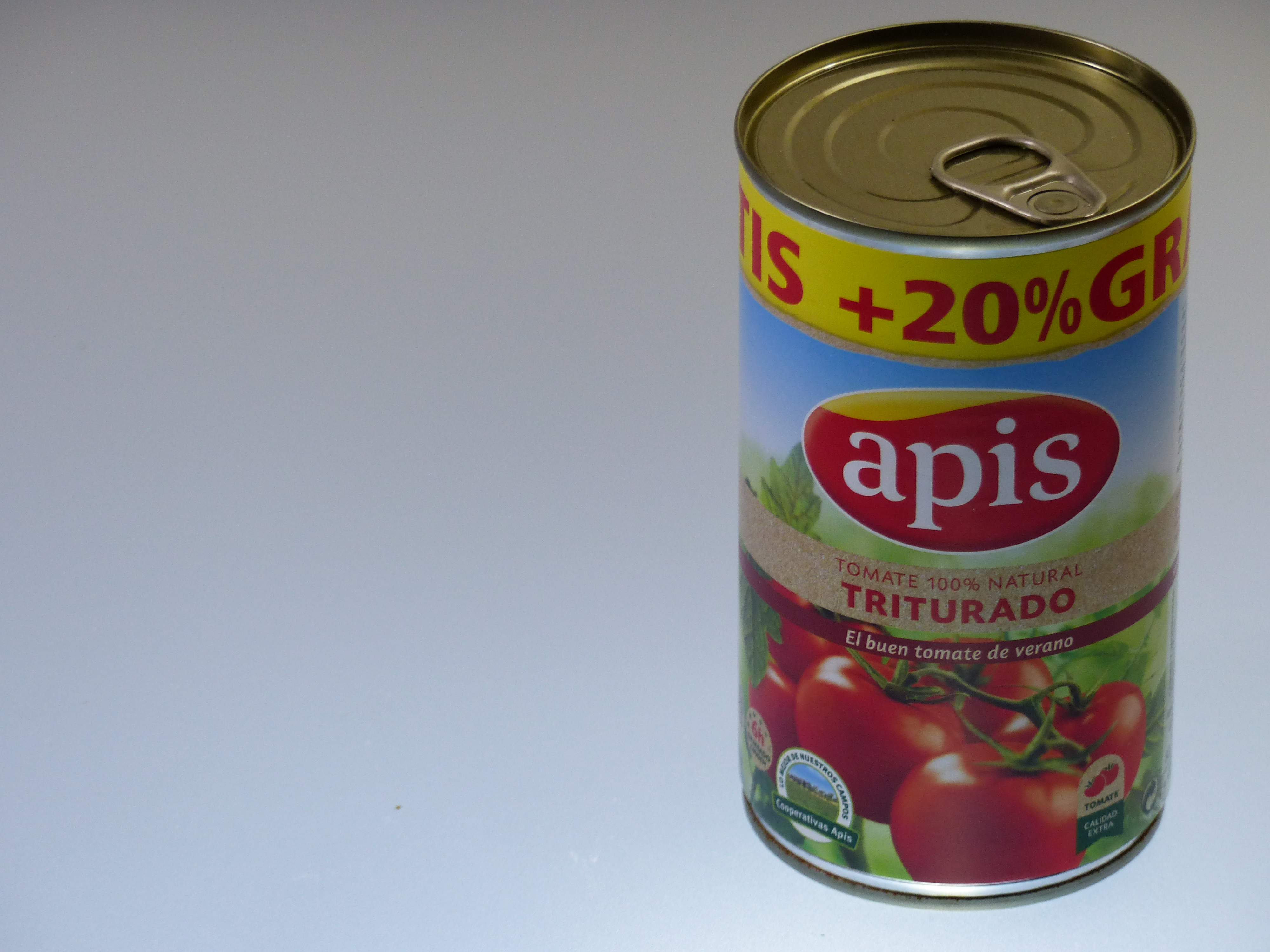 Tomate Apis, lata